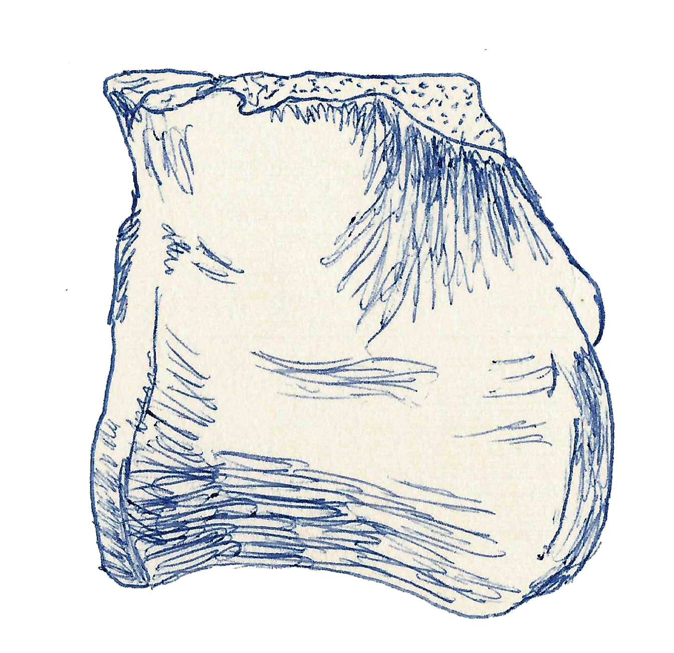 Illustration of a fossil of Dryptosauroides